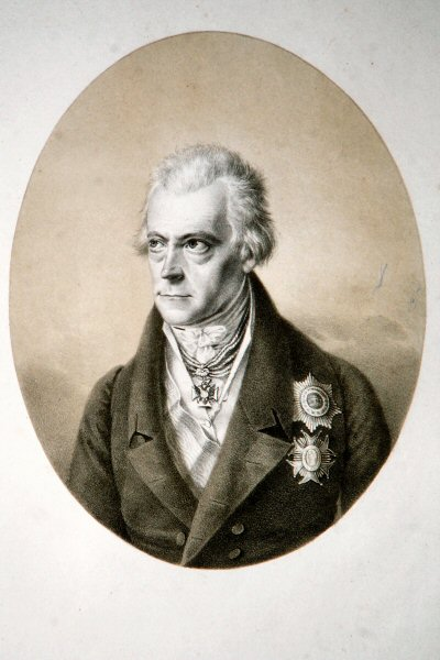 Johann Rudolf von Buol-Schauenstein (1763-1834), k. k. Beamter und Diplomat. Lithographie von Friedrich Lieder, ca. 1830